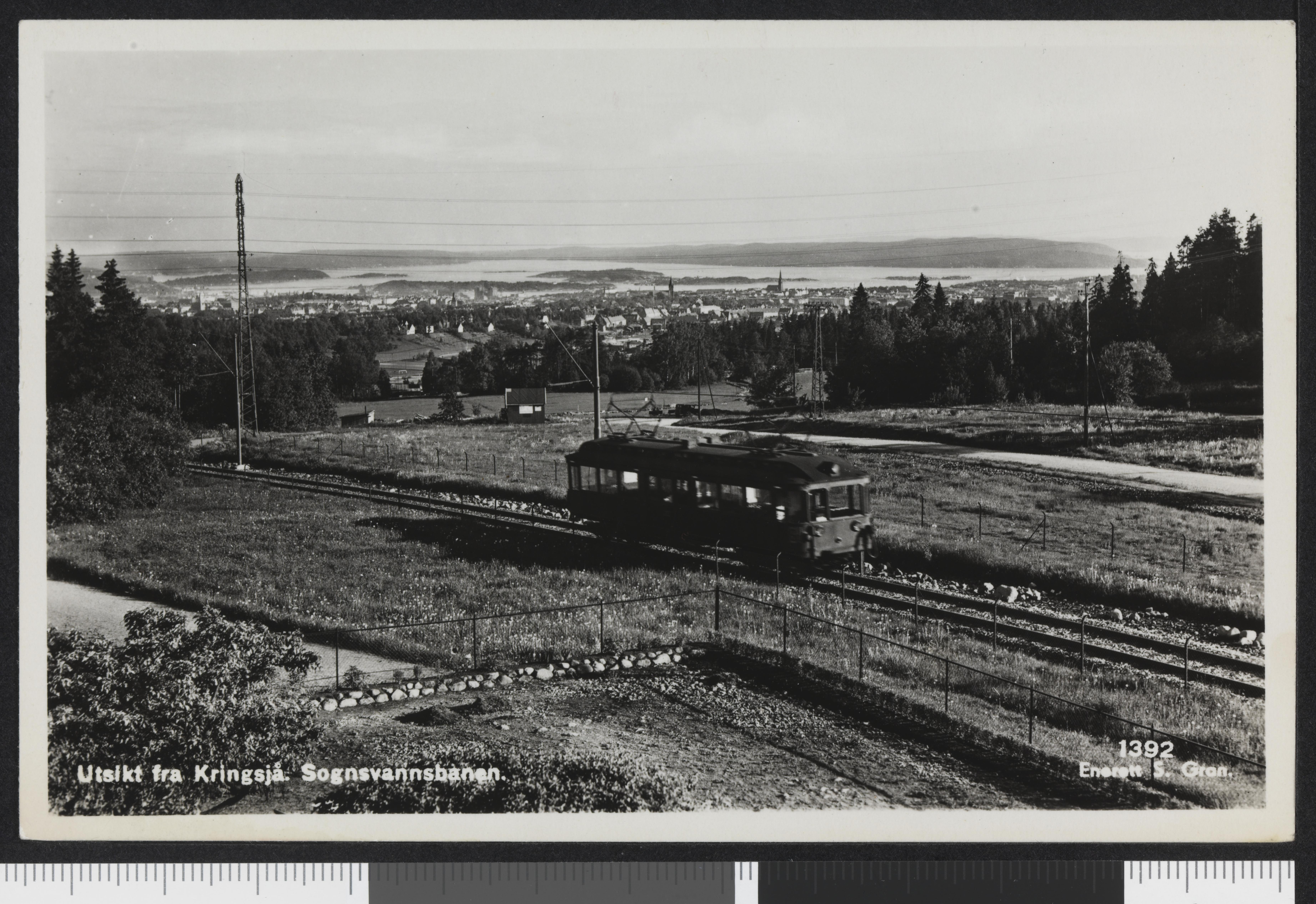 Bildet er hentet fra Nasjonalbibliotekets bildesamling Kringsjå, Oslo, Oslo